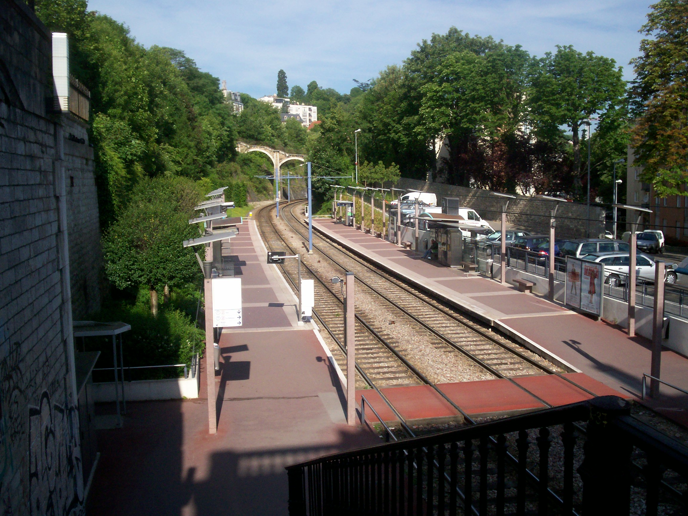 Paris Tramway T2